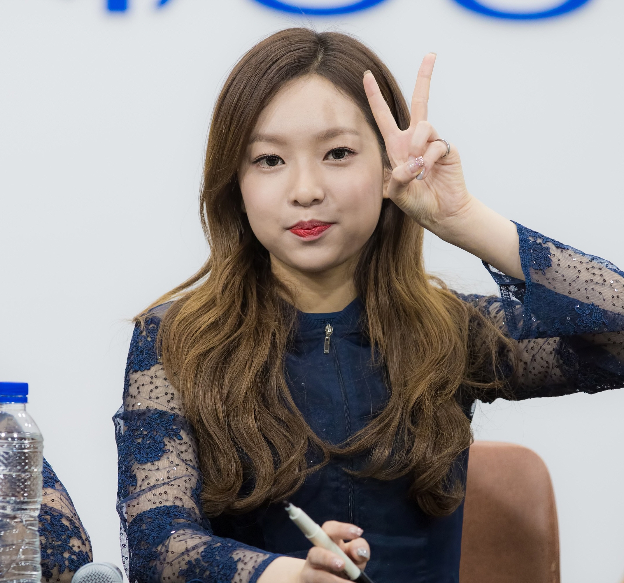 170205 대전 APRIL 팬싸인회 예나 2Pic